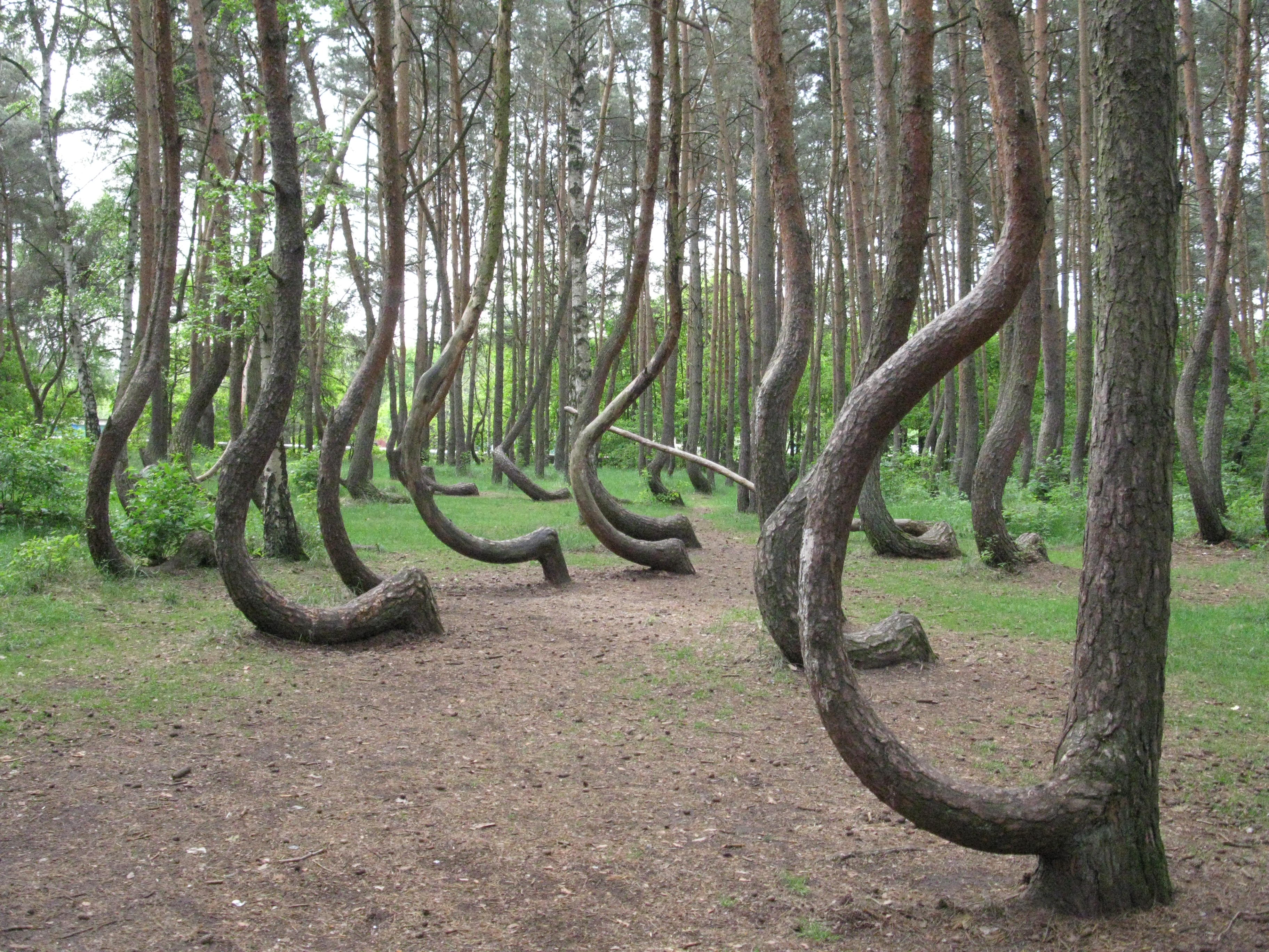 Krzywy Las w Nowym Czarnowie